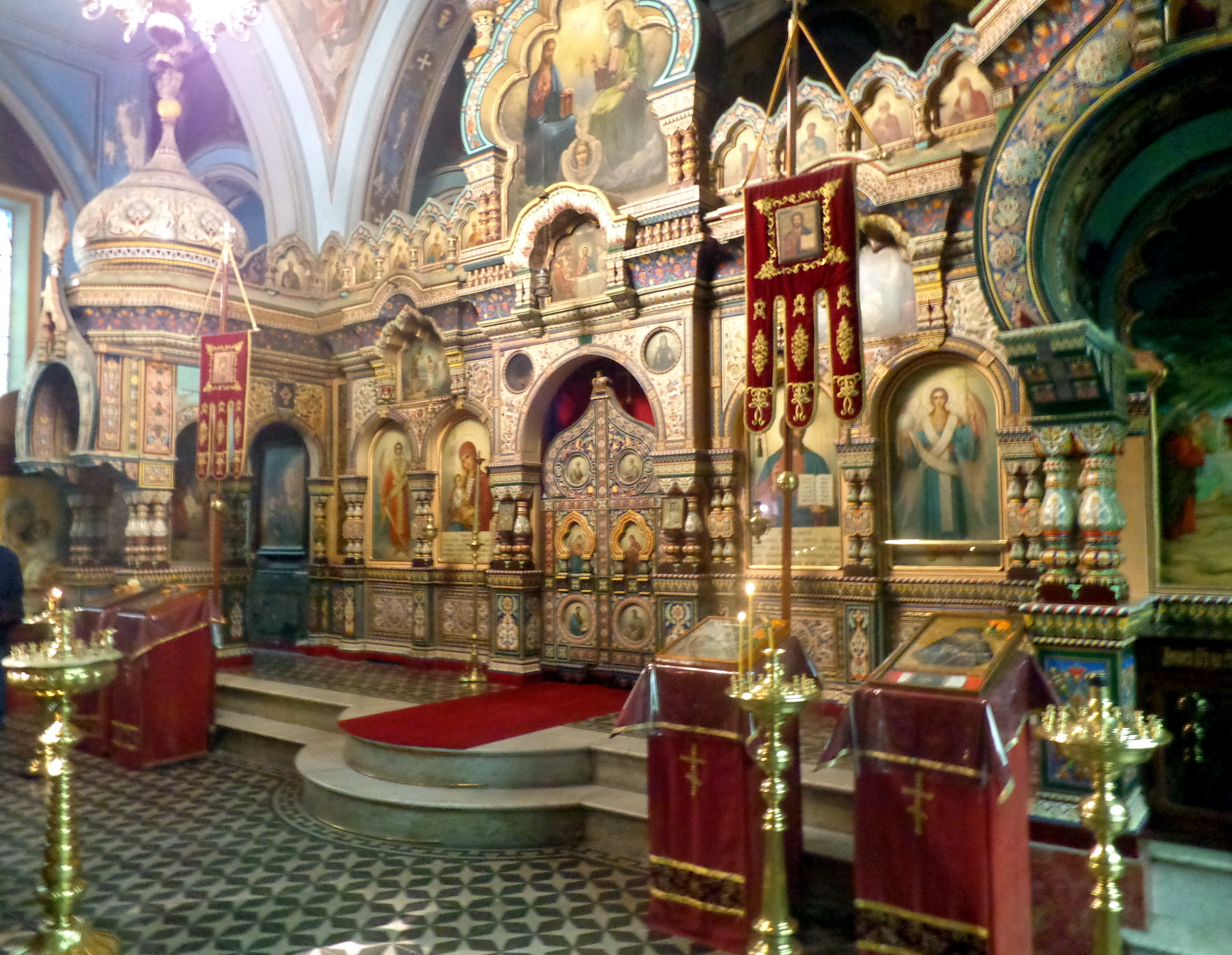 Iglesia Ortodoxa Rusa de la Santísima Trinidad, en el barrio de Monserrat, Buenos Aires, Argentina. M. T. Preobrazshensky-Alejandro Cristophersen.